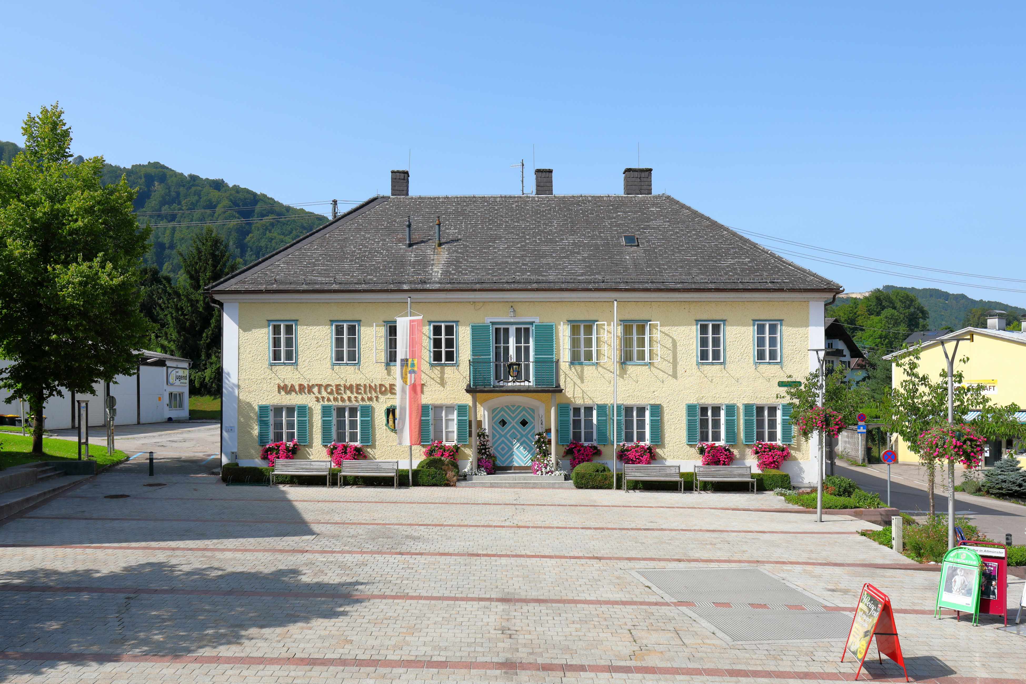 Das unter Denkmalschutz stehende Gemeinde- und Standesamt in der oberösterreichischen Marktgemeinde Altmünster im Bezirk Gmunden.